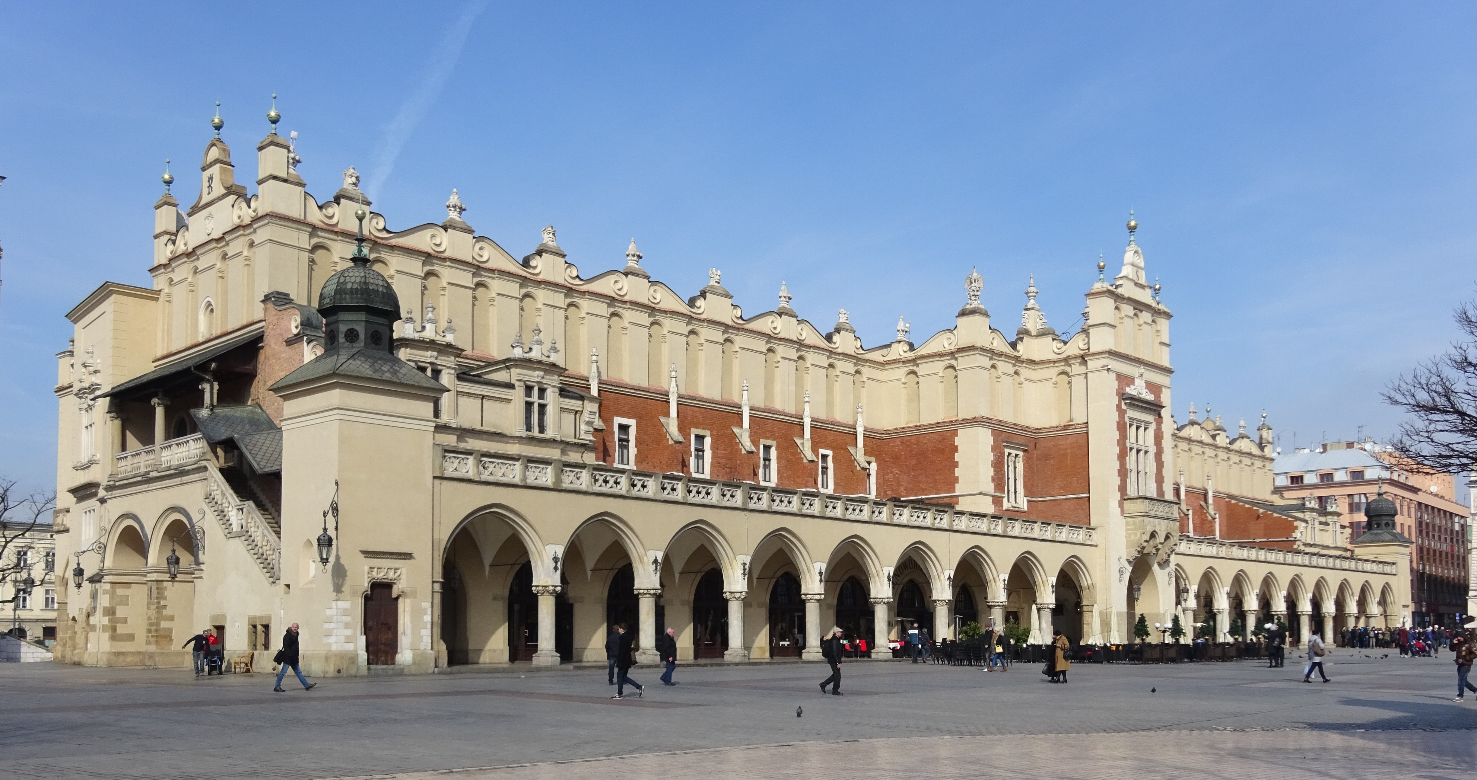 Sukiennice w Krakowie. Widok z południowego wschodu. 2016